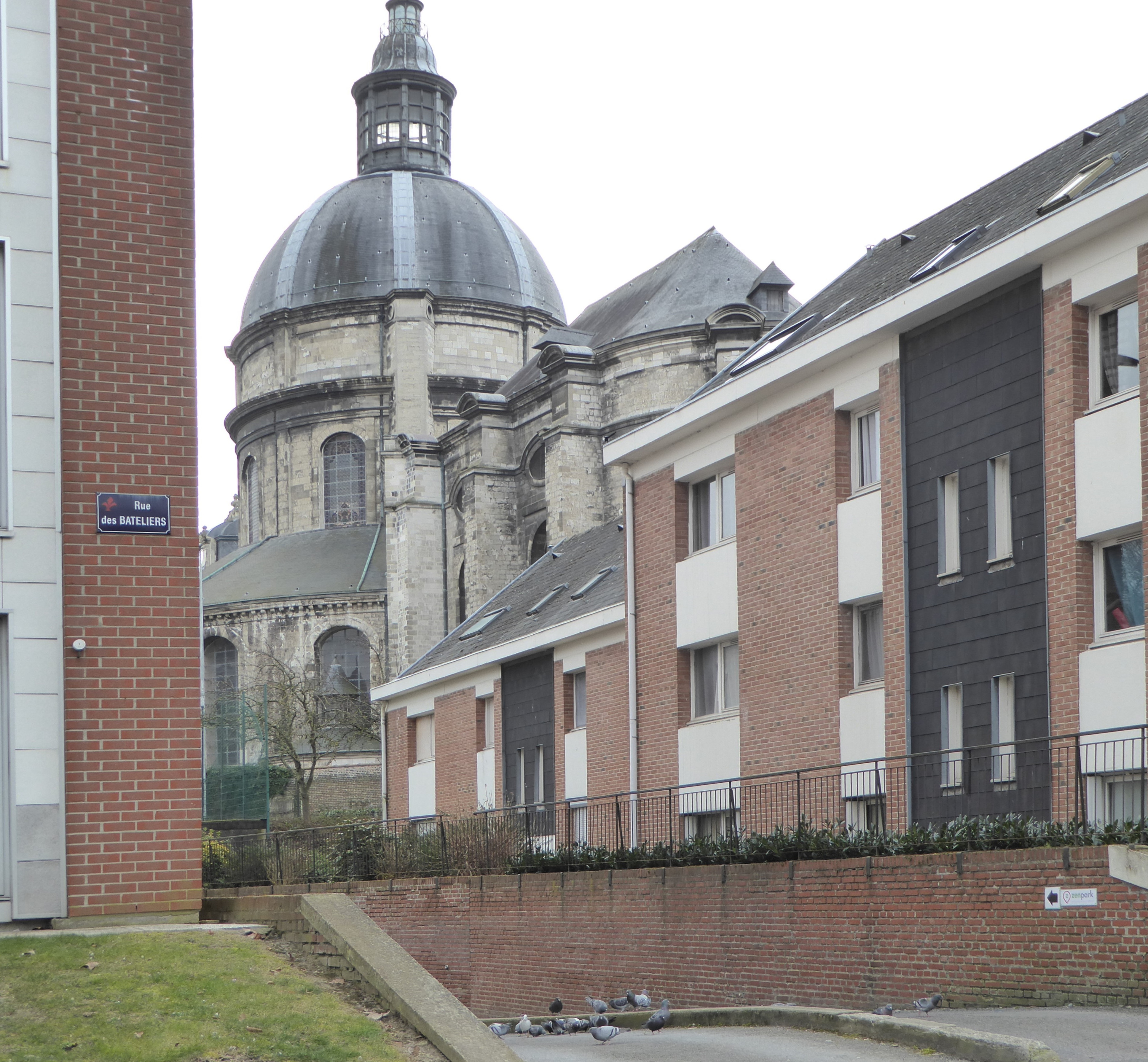 L' Église Sainte-Marie-Madeleine vue de la rue des Bateliers Lille Nord (département français)